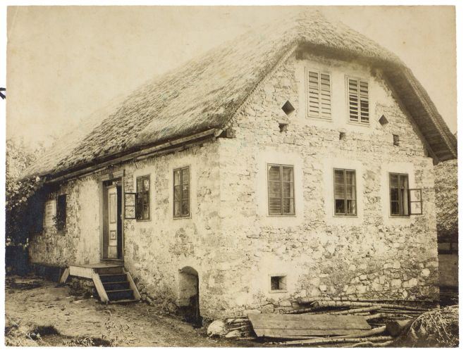 Rojstna hiša Frana Levstika